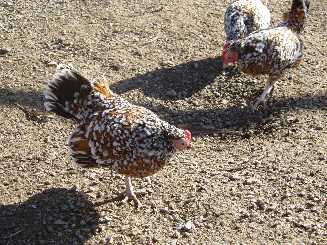 chicken, Ölänsk dvärghöna, swedish chicken breed